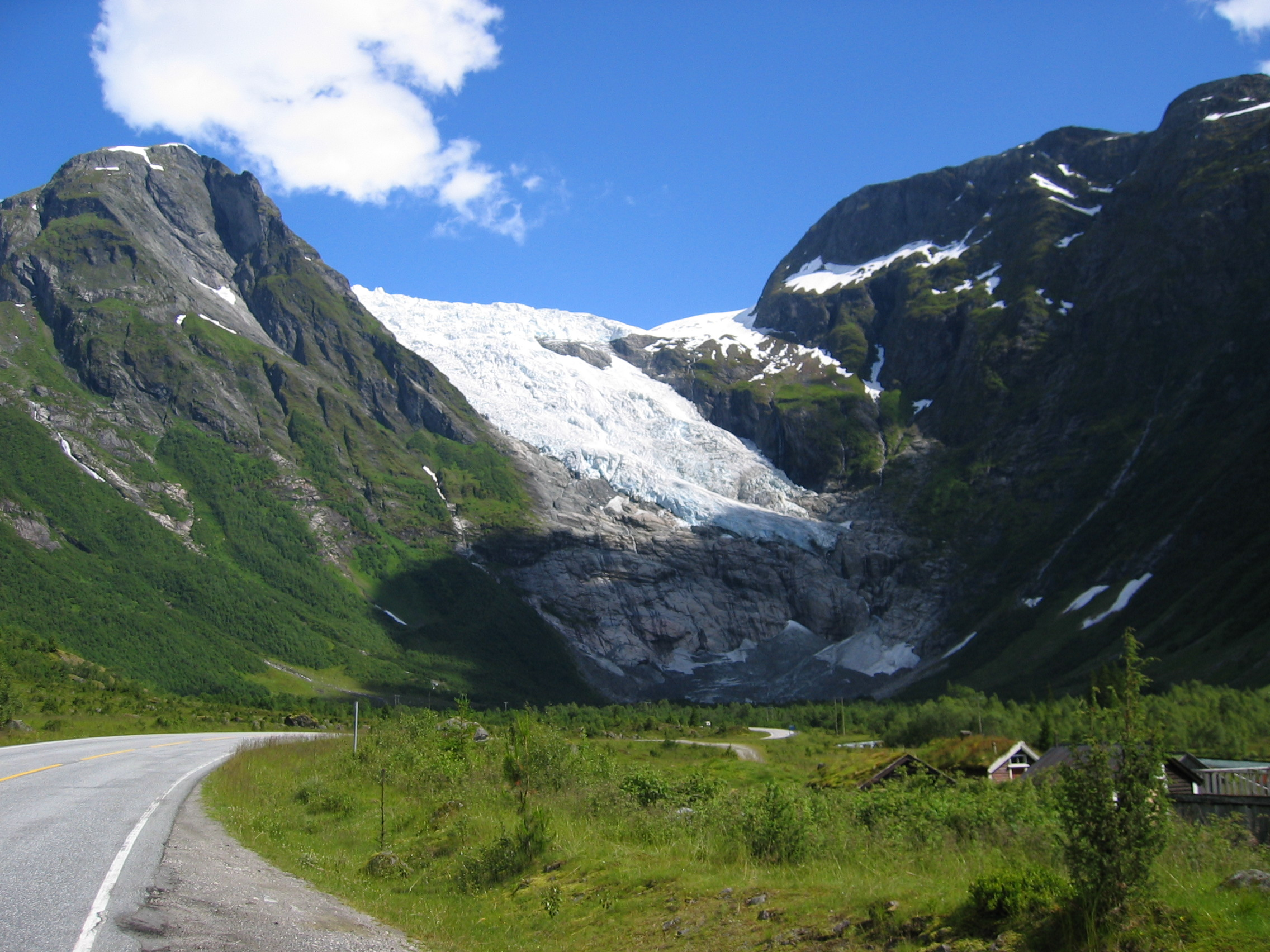 Bøyabreen - Riksveg 5